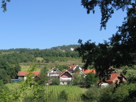 Бело Поље.